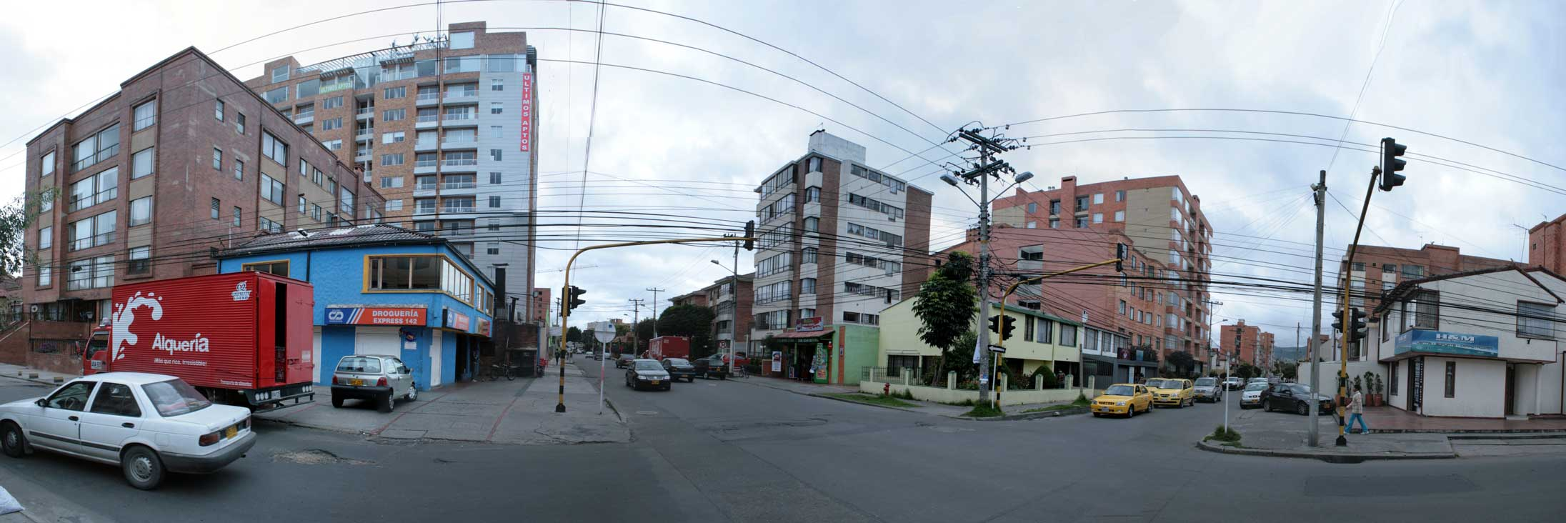 Cedritos